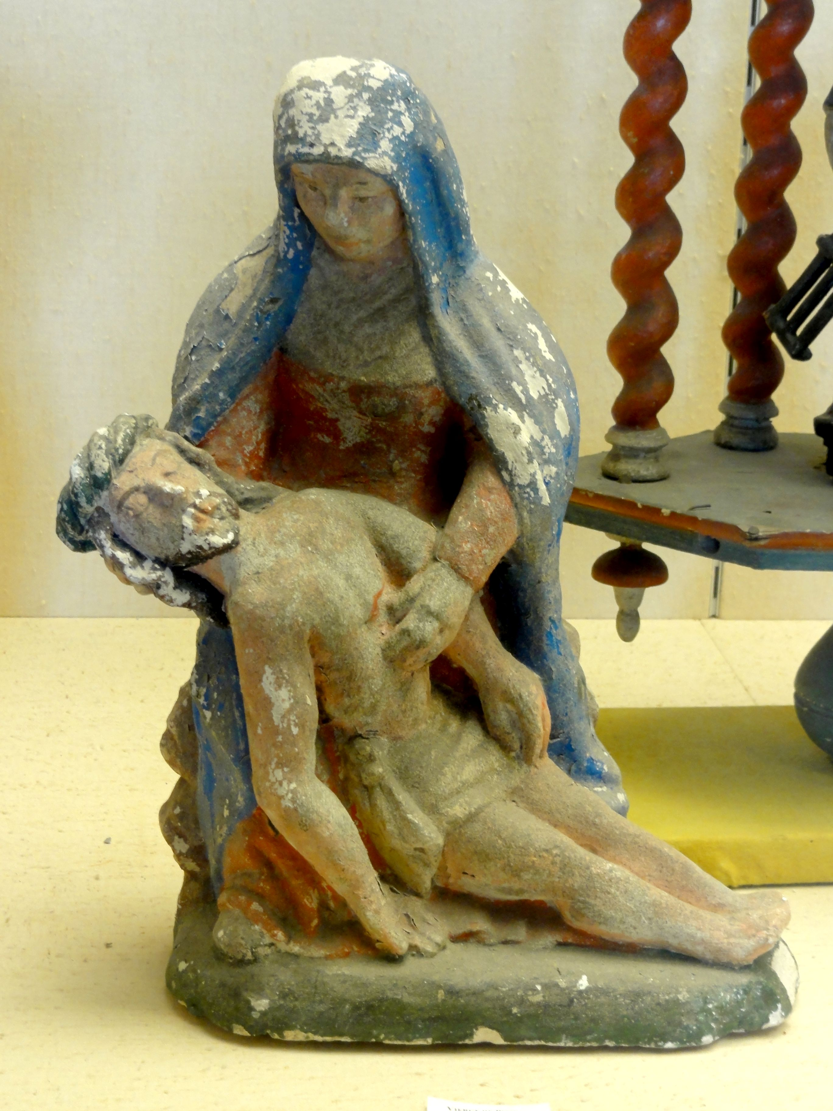 Pietà, pierre polychrome, XVIe s., en provenance de l'église Saint-Fuscien.